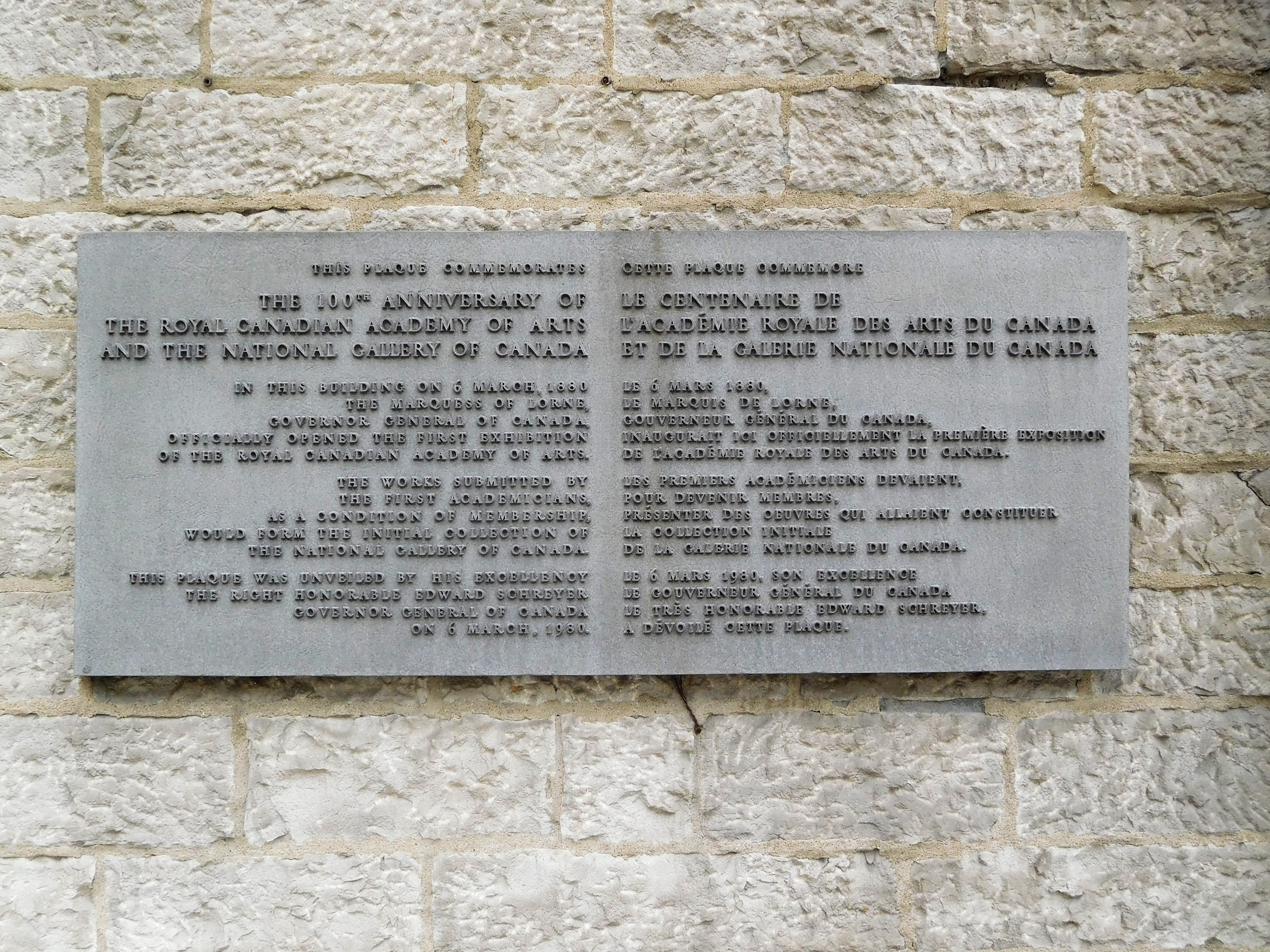 This plaque commemorate The 100th Anniversary of the Royal Canadian Academy of Arts and the National Gallery of Canada